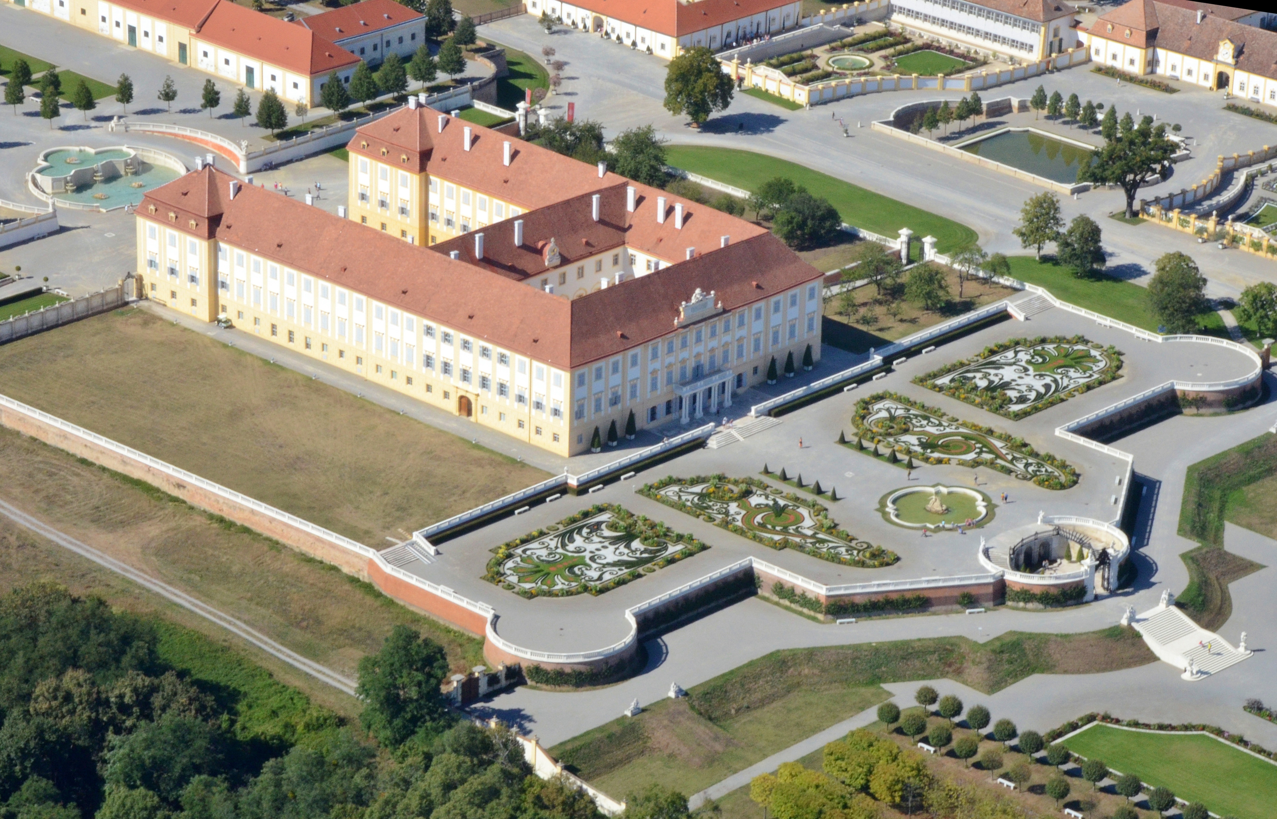 Schloßhof